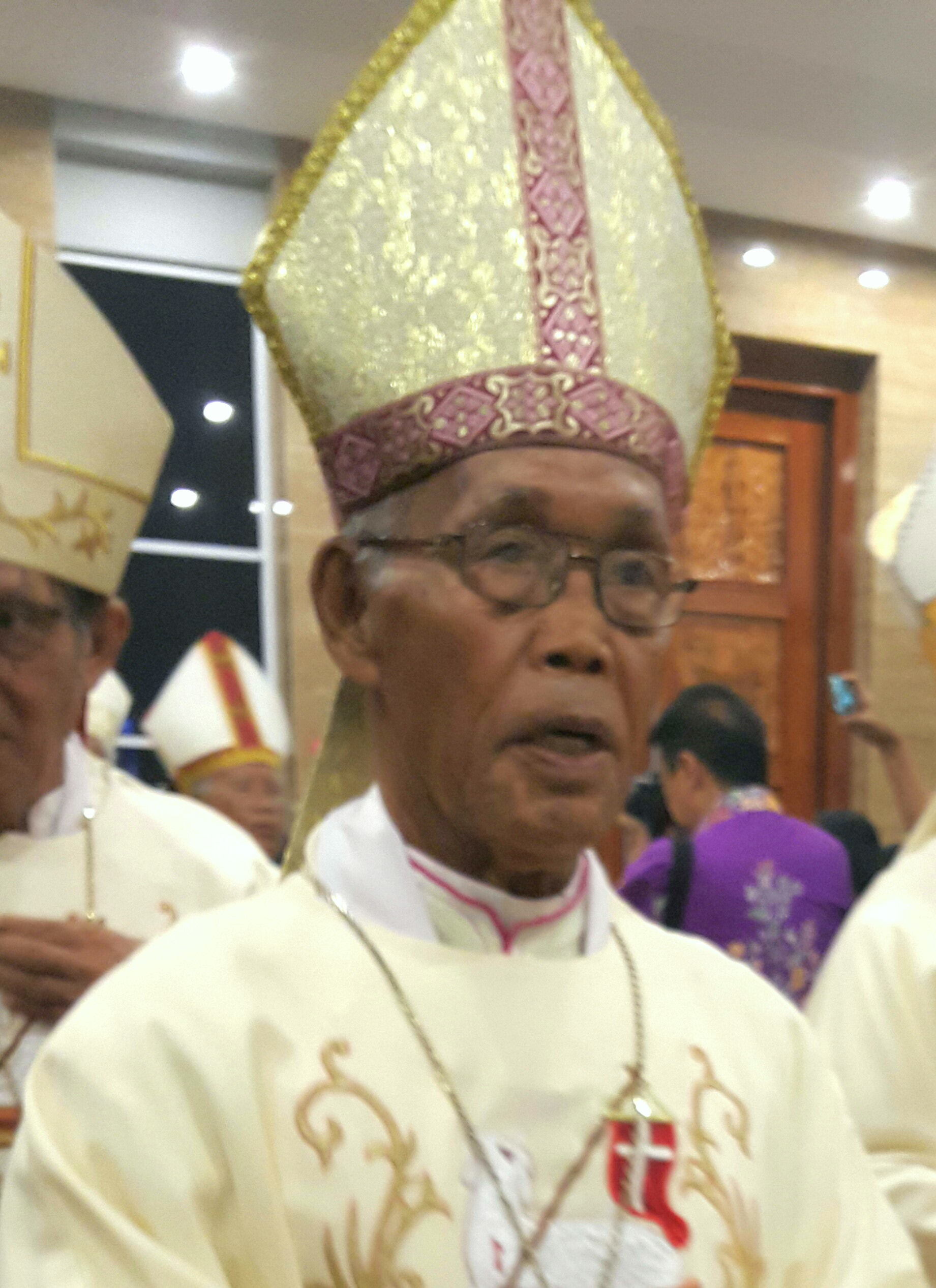 Mgr Cosmas Michael Angkur, Uskup Emeritus Bogor